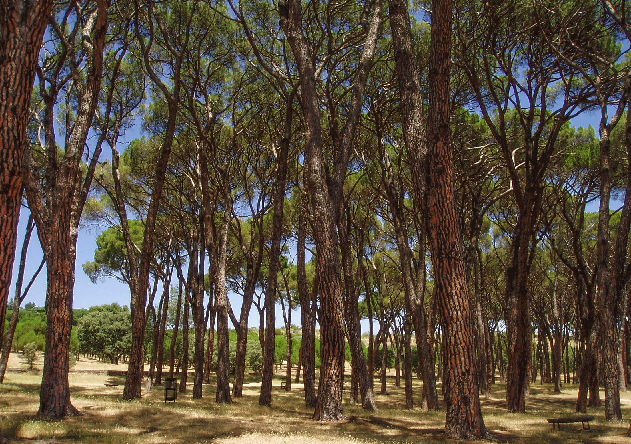 Pinar de Siete Hermanas. Casa de Campo. Madrid. España